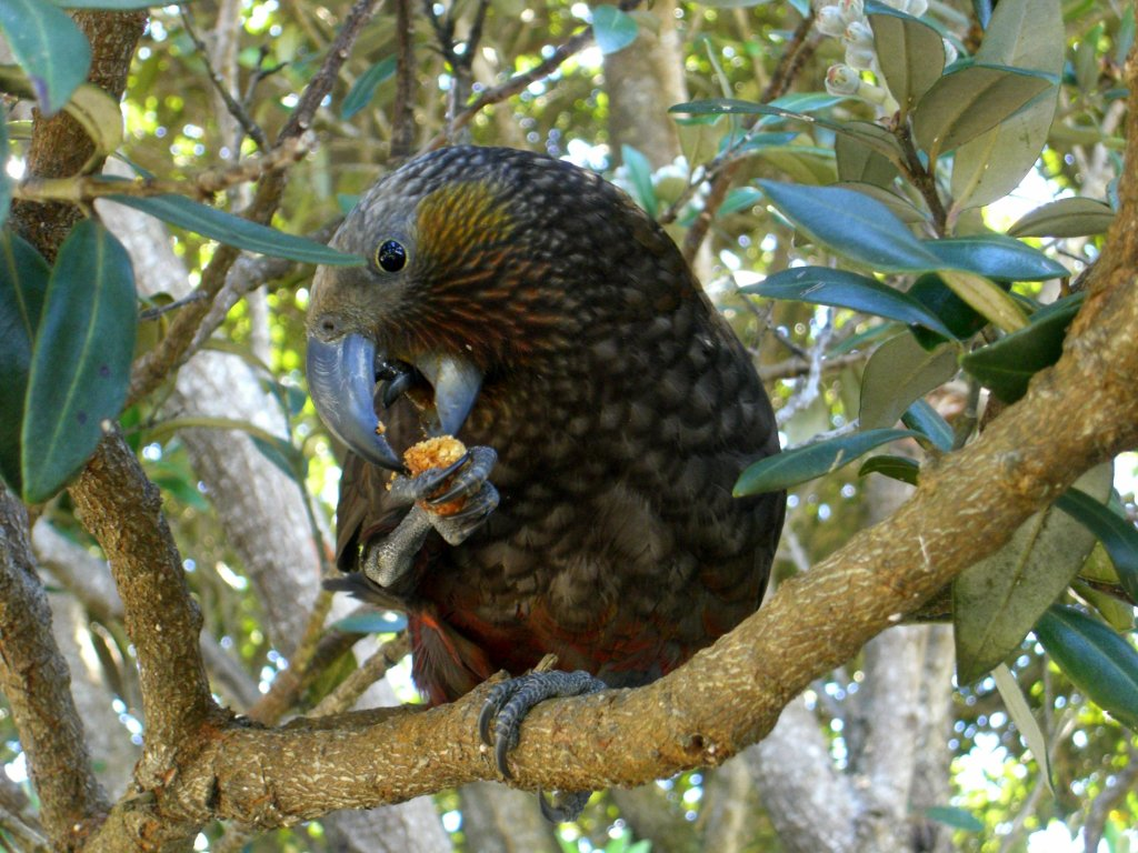 Kaka auf Kapiti Island